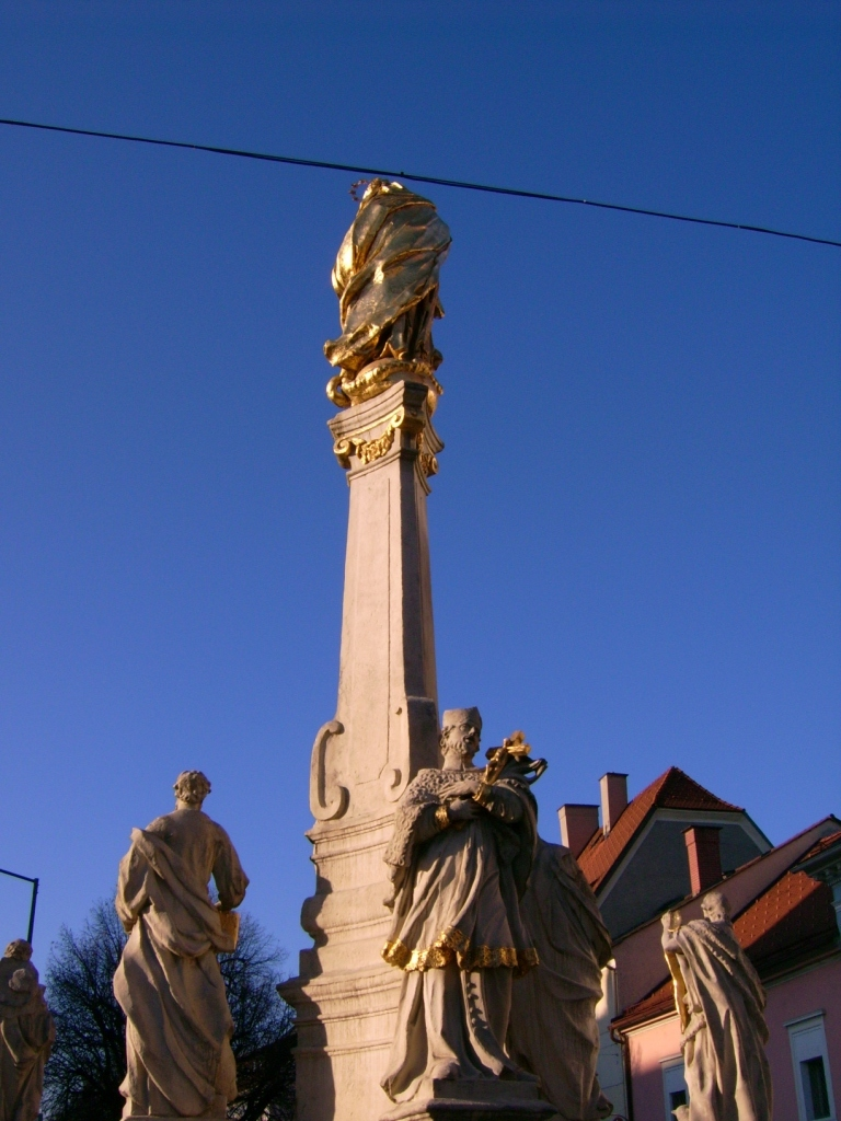 Marien Säule am Voitsberger Hauptplatz